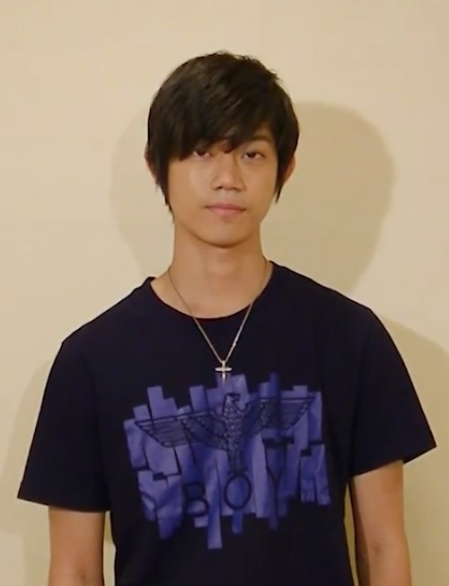 高橋健介（俳優）